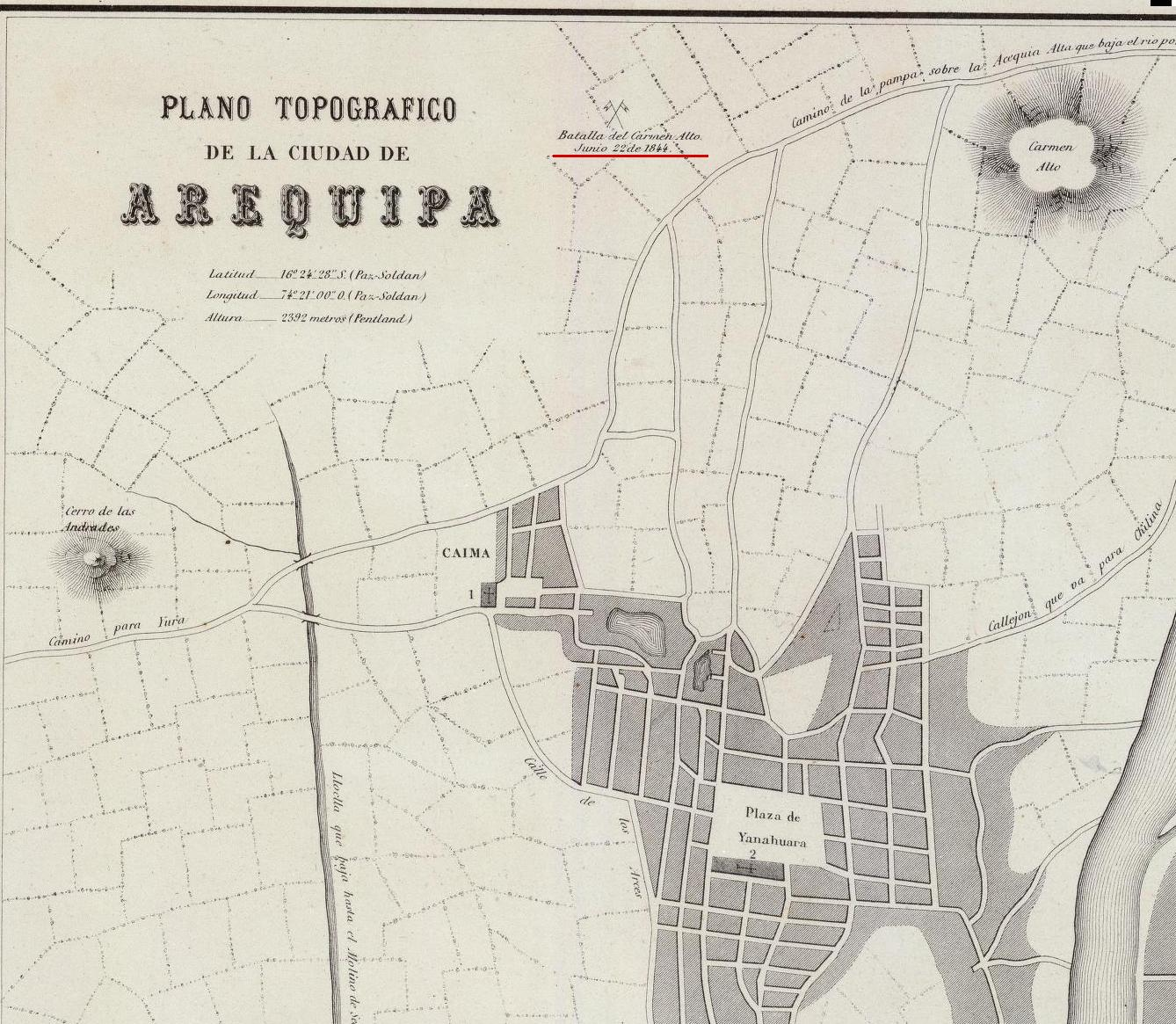 Detalle del Plano Topográfico de Arequipa elaborado por Mariano Paz Soldán en el año 1865 en el que se muestra el escenario de la batalla de Carmen Alto (1844).